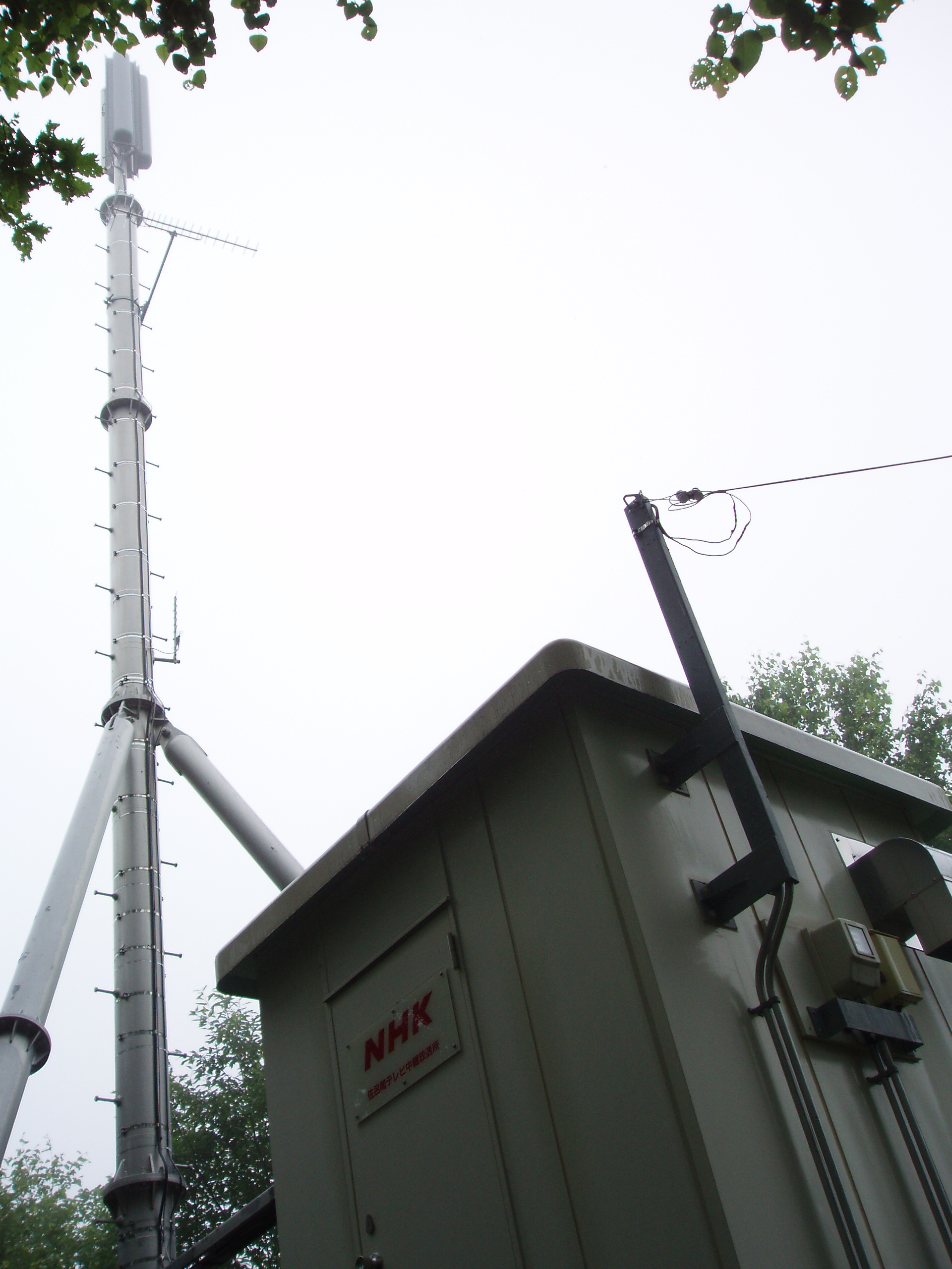 佐呂間中継局 NHK送信設備